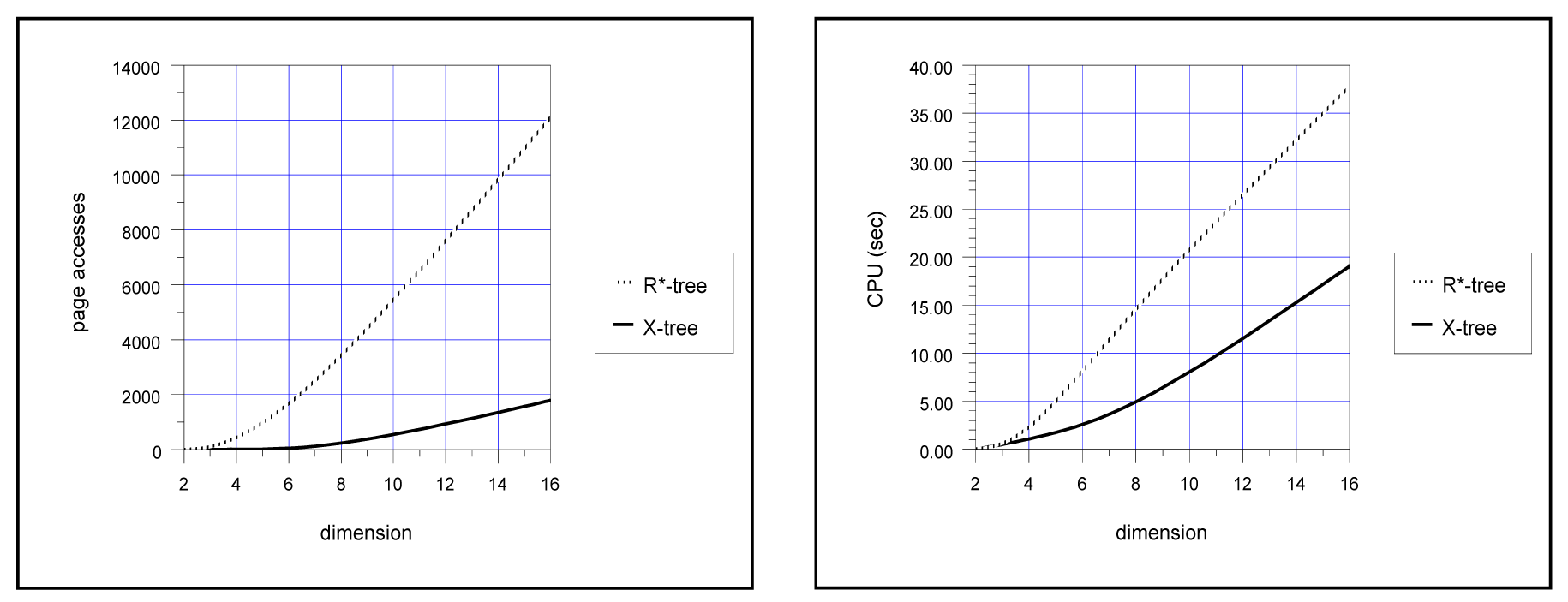 performanse x-stabla